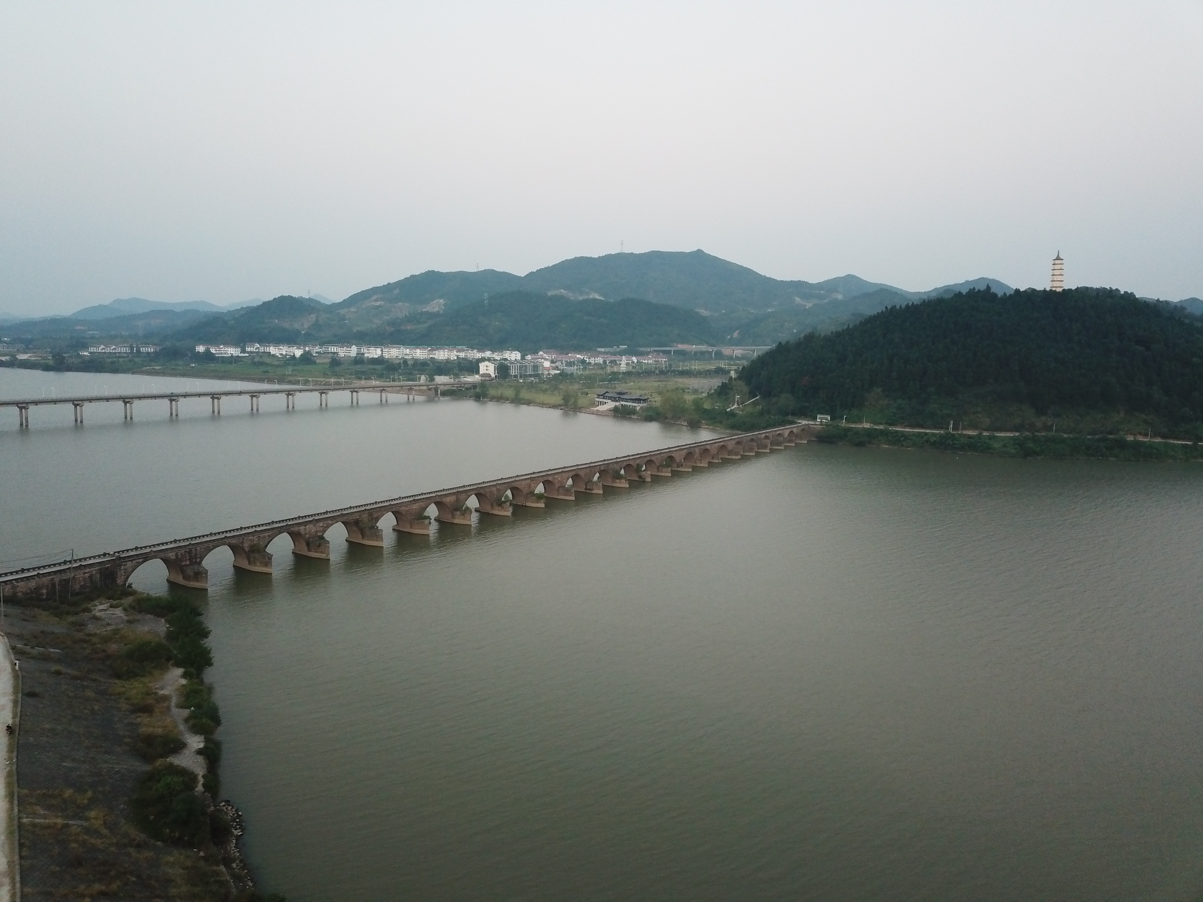 南城万年桥